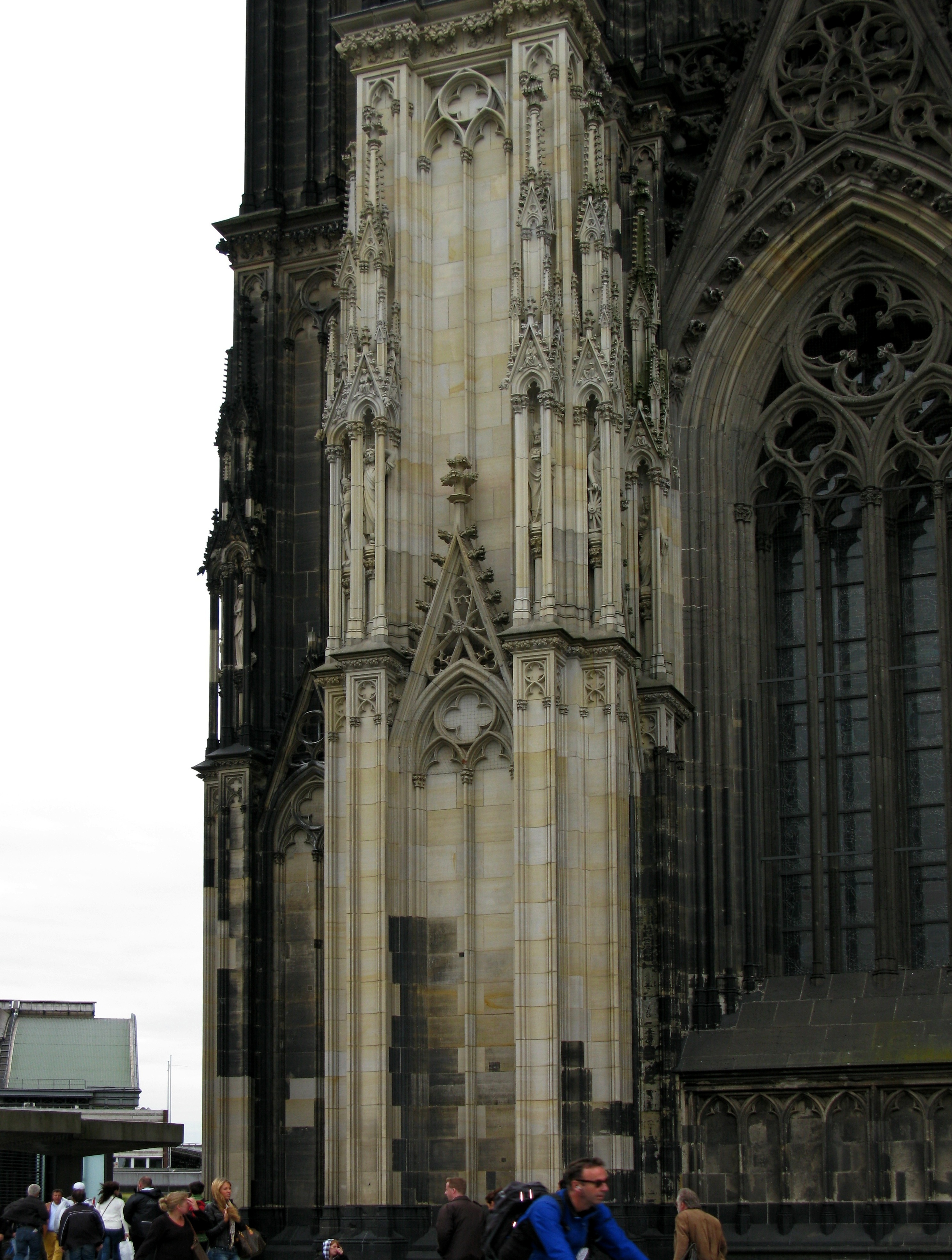 Kölner Dom, Domkloster 4This is a photograph of an architectural monument.